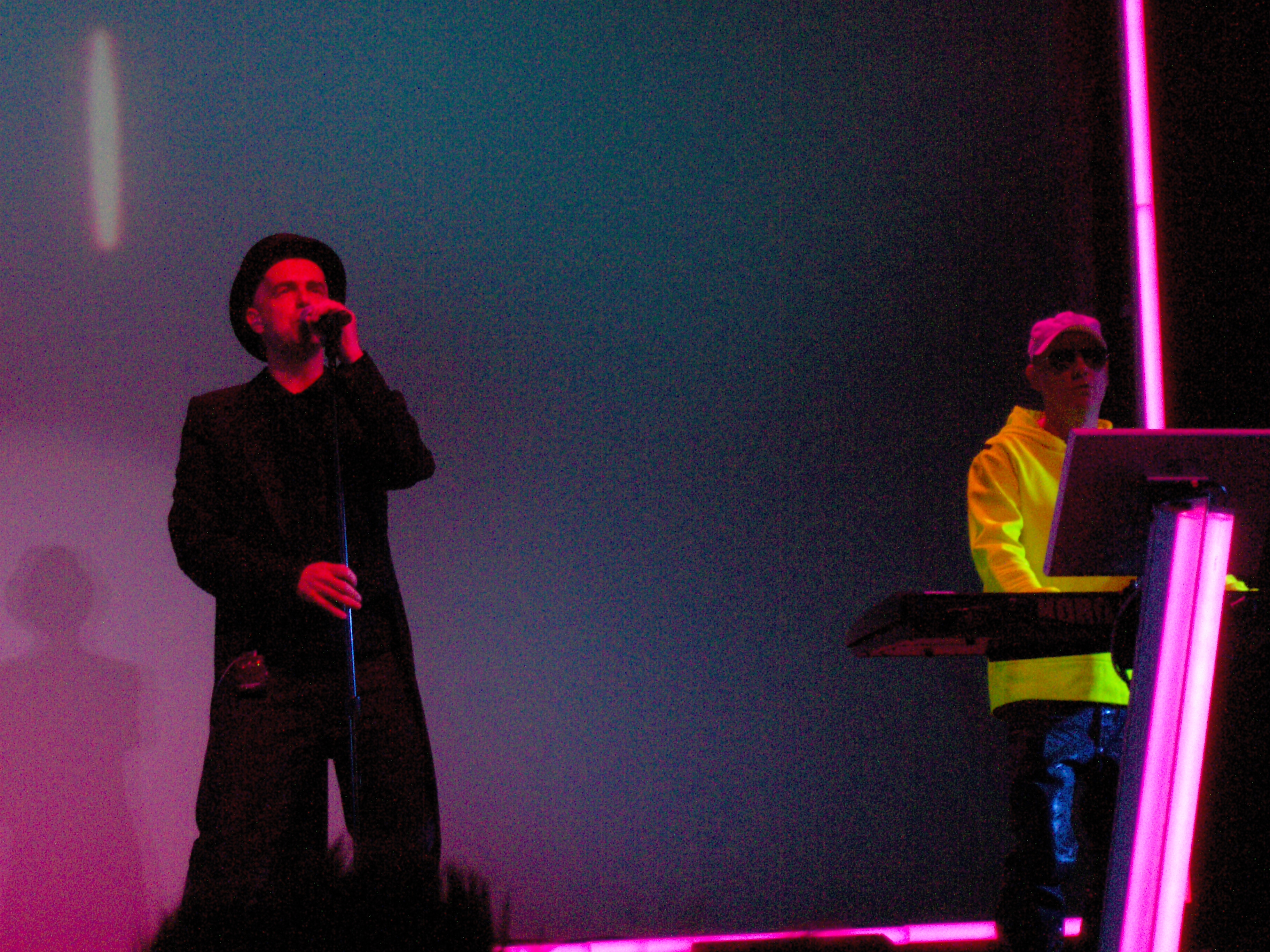 Pet Shop Boys live in Tivoli Gardens, Copenhagen